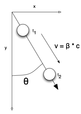 Schema décrivant le déplacement d'un objet, en support à la description de la vitesse supraluminique observée dans les (micro)quasars.